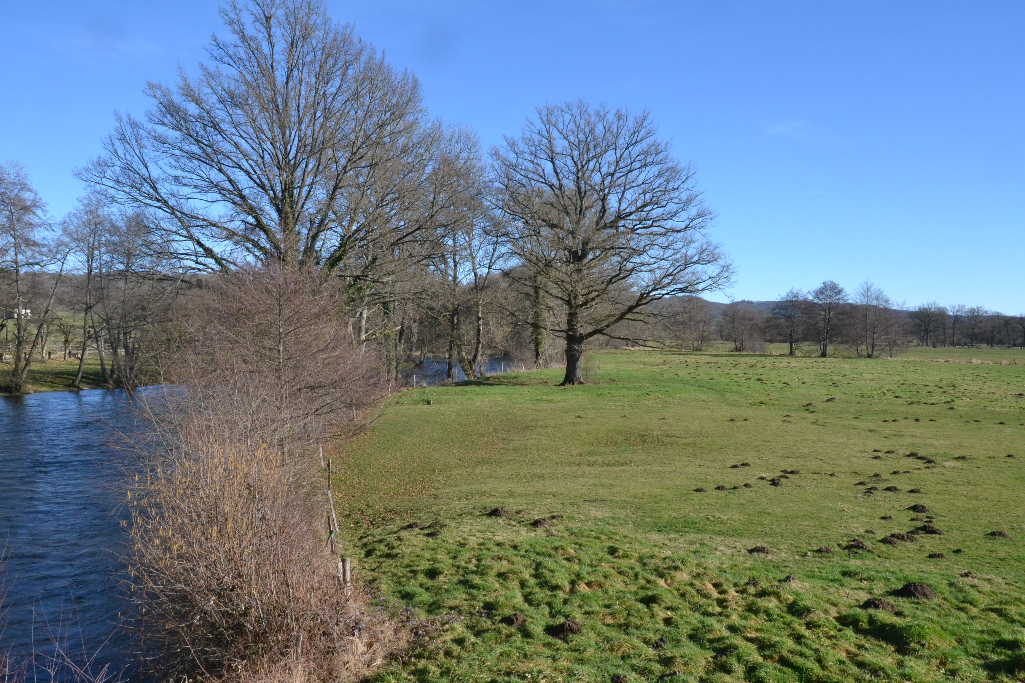 Paysage de la vallée de la Creuse à Moutier-d'Ahun (Creuse, France)